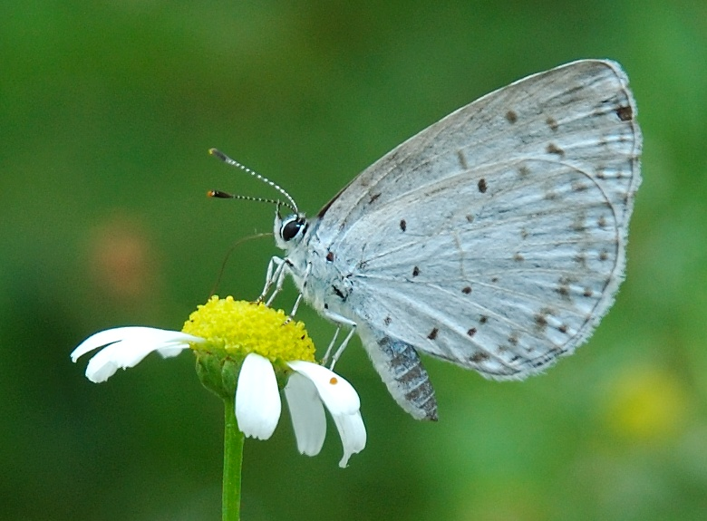 Celastrina argiolus (ルリシジミ)